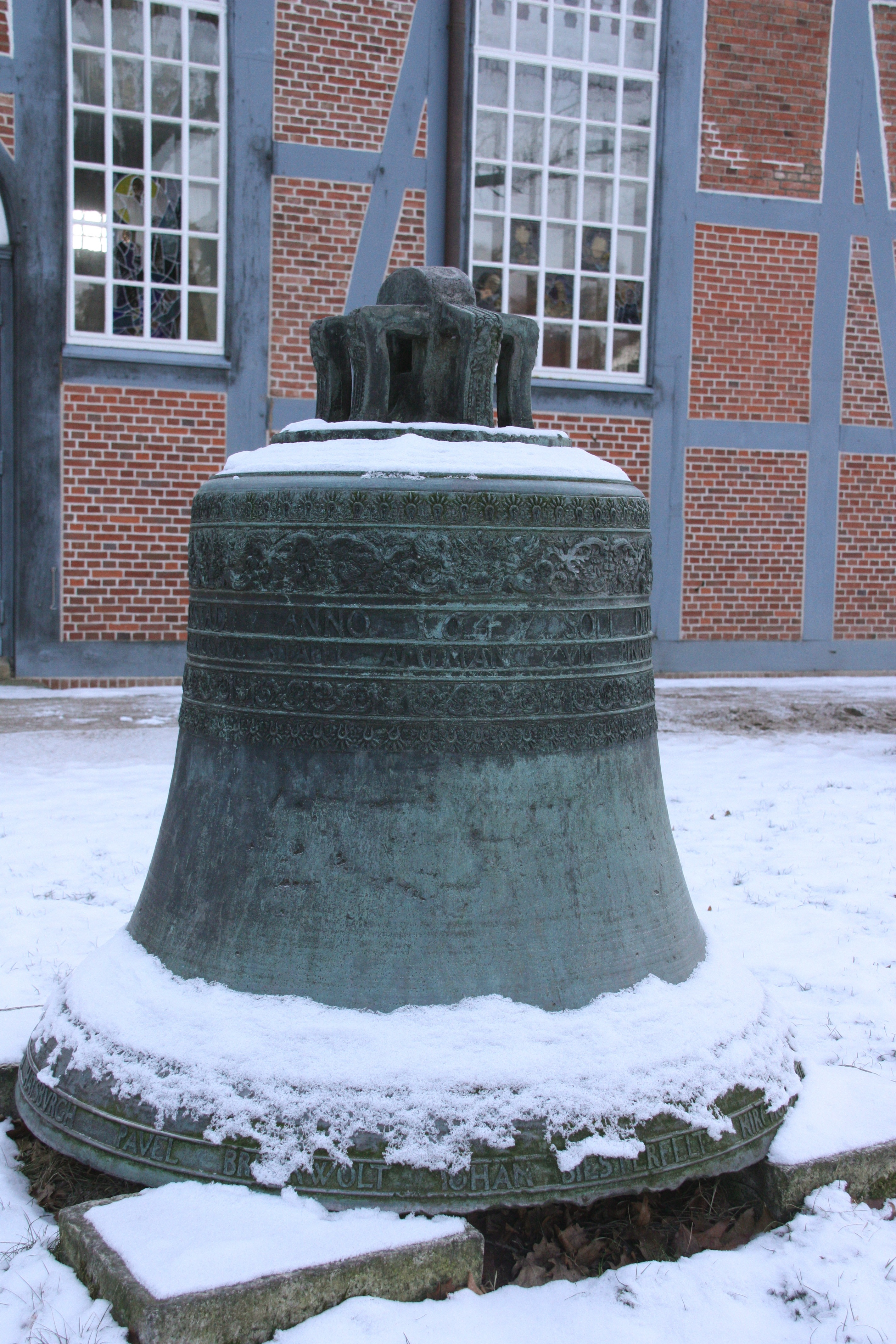 Hamburg, Nienstedtener Kirche, Glocke vor der Kirche